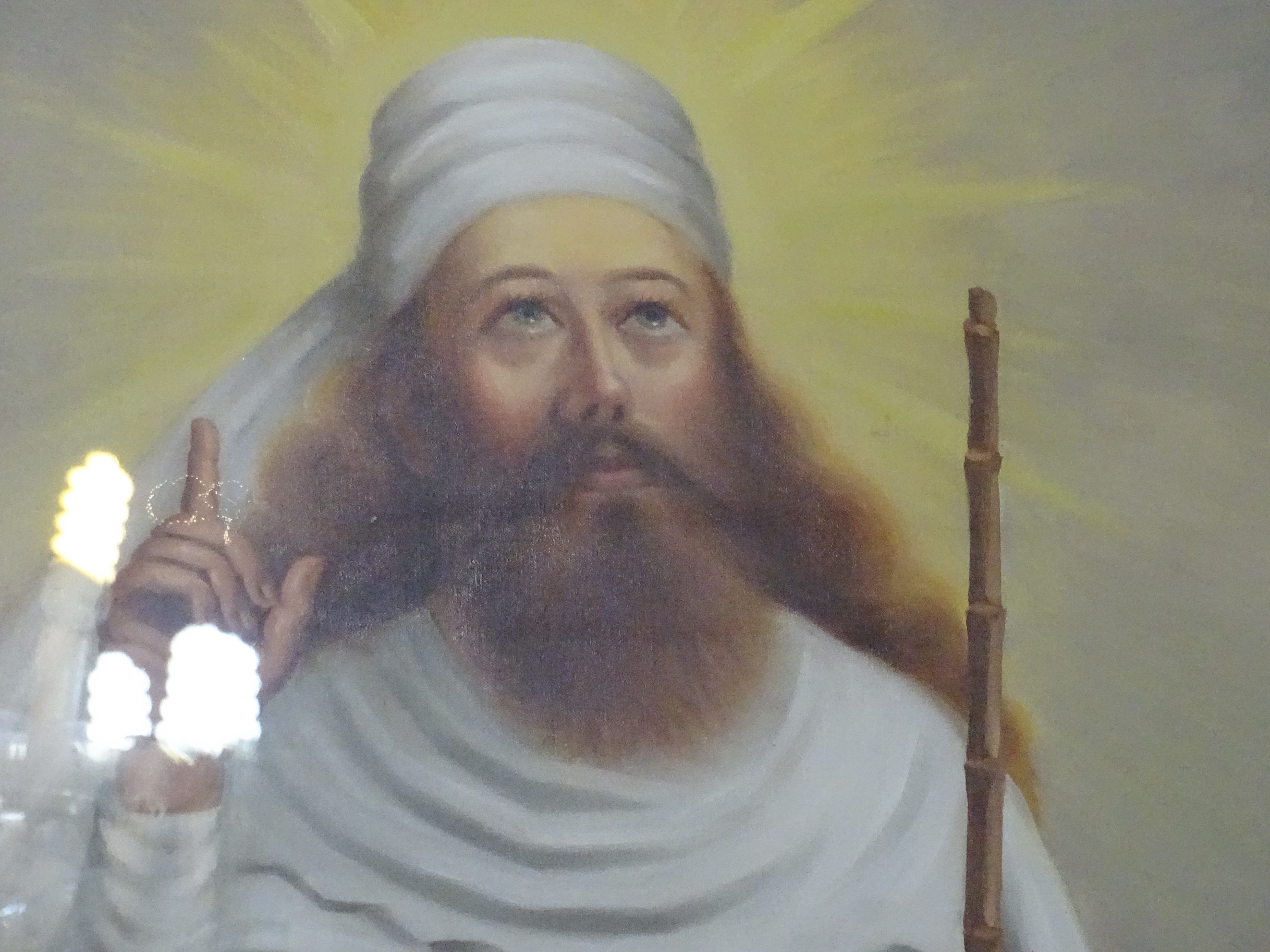 La représentation actuelle de Zarathoustra (ou Zoroastre).